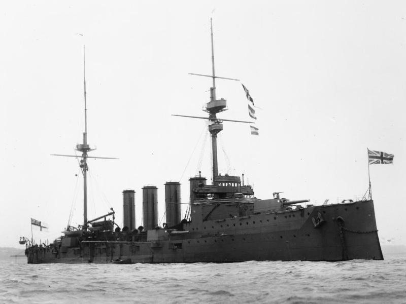 HMS DUKE OF EDINBURGH.